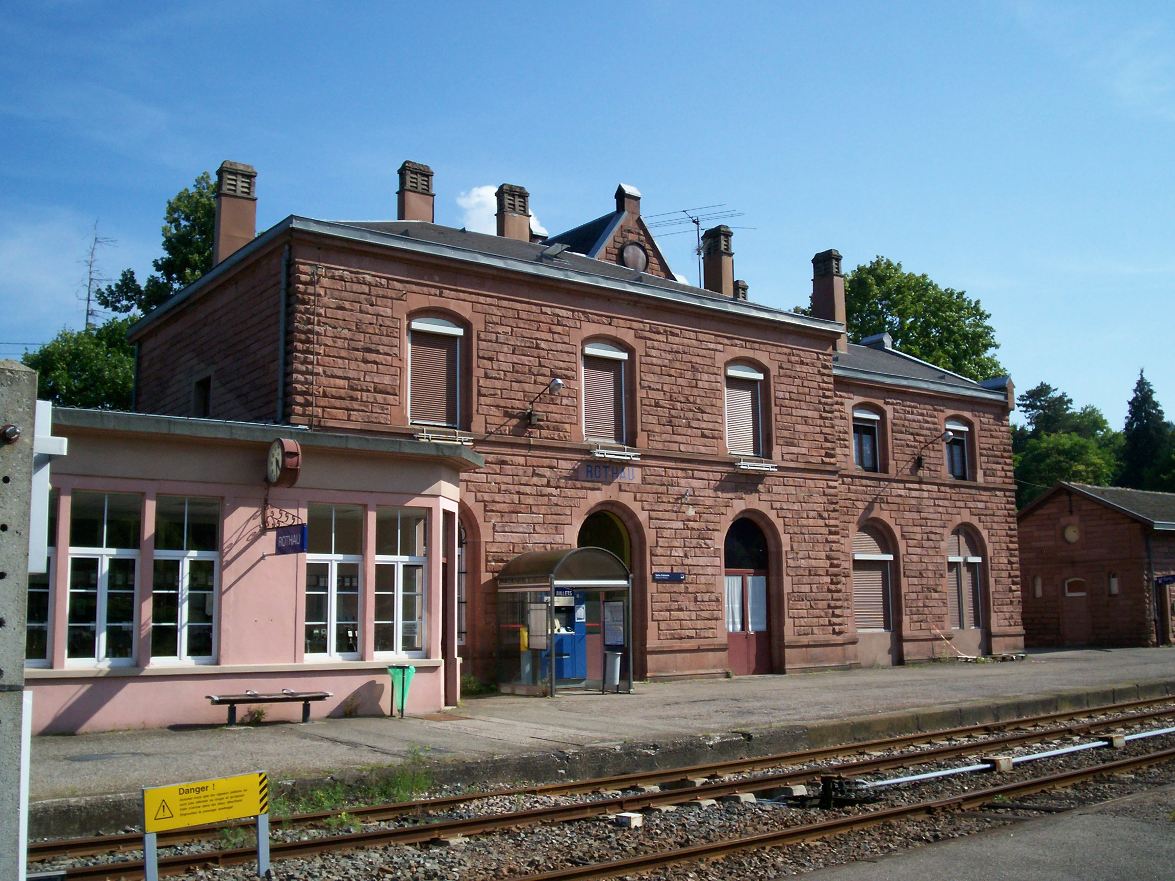 Bâtiùment Voyageurs de Rothau côté voies ferrées